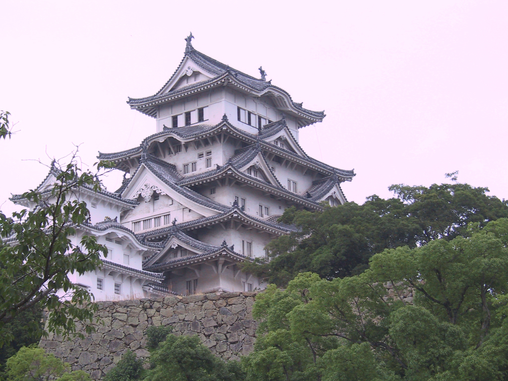 Himeji Castle, Himeji, Hyogo, Japan.